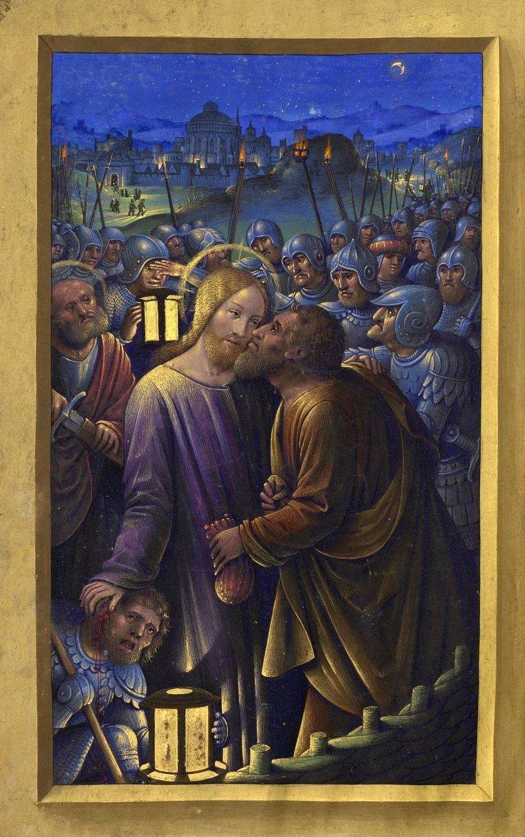 Baiser de Judas